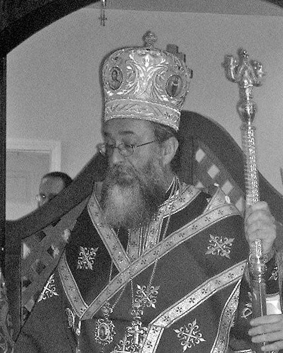 Епископ Лонгин (Крчо)